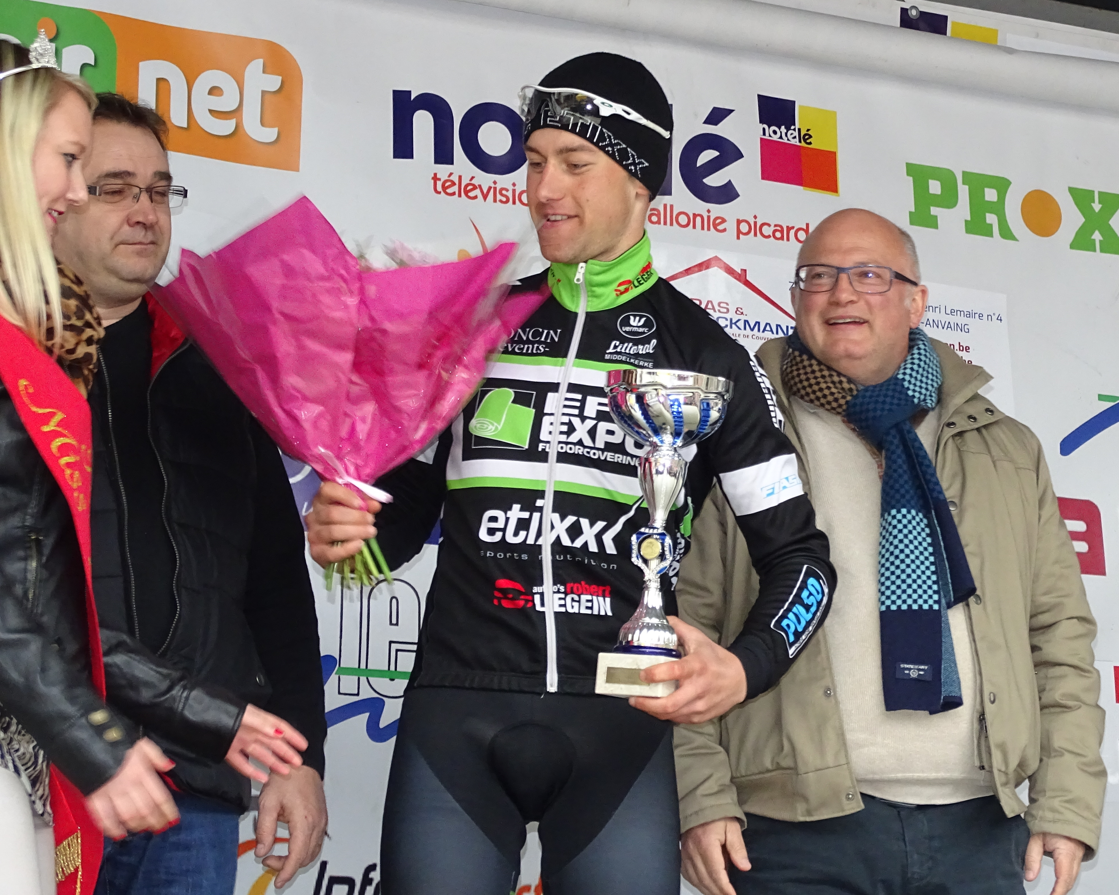 Triptyque des Monts et Châteaux 2015 Depicted team: EFC-Etixx